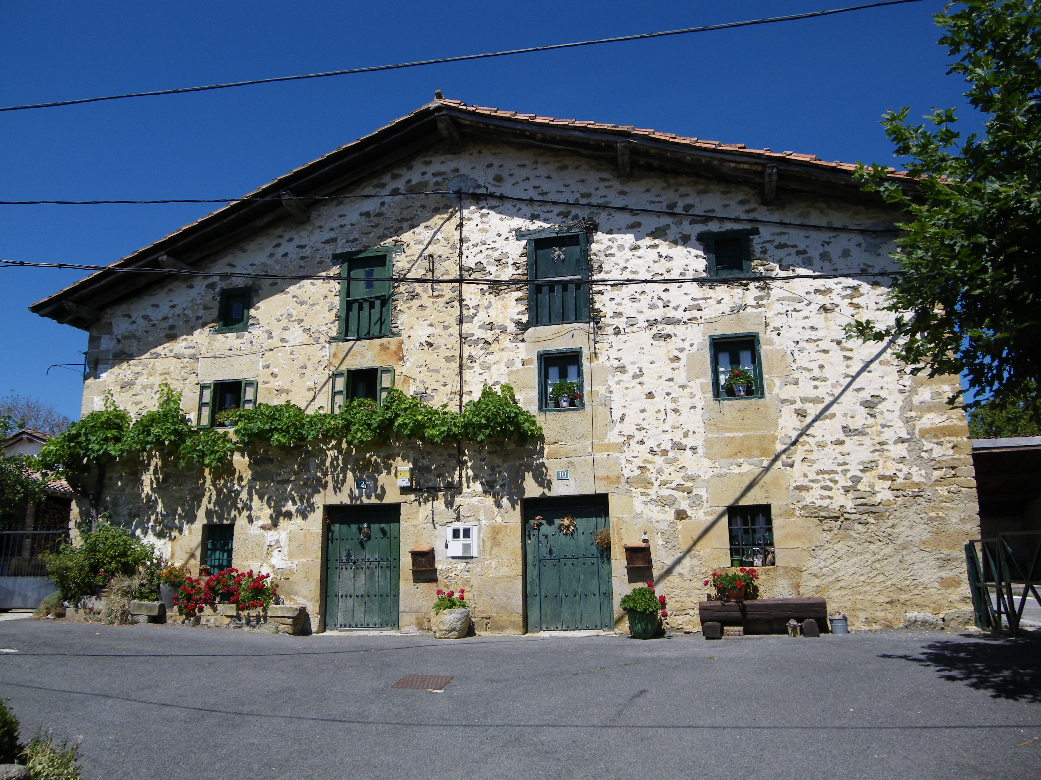 Maurgako baserri-etxe baten aurrealdea. Maurga, Zigoitia, Araba, Euskal Herria.